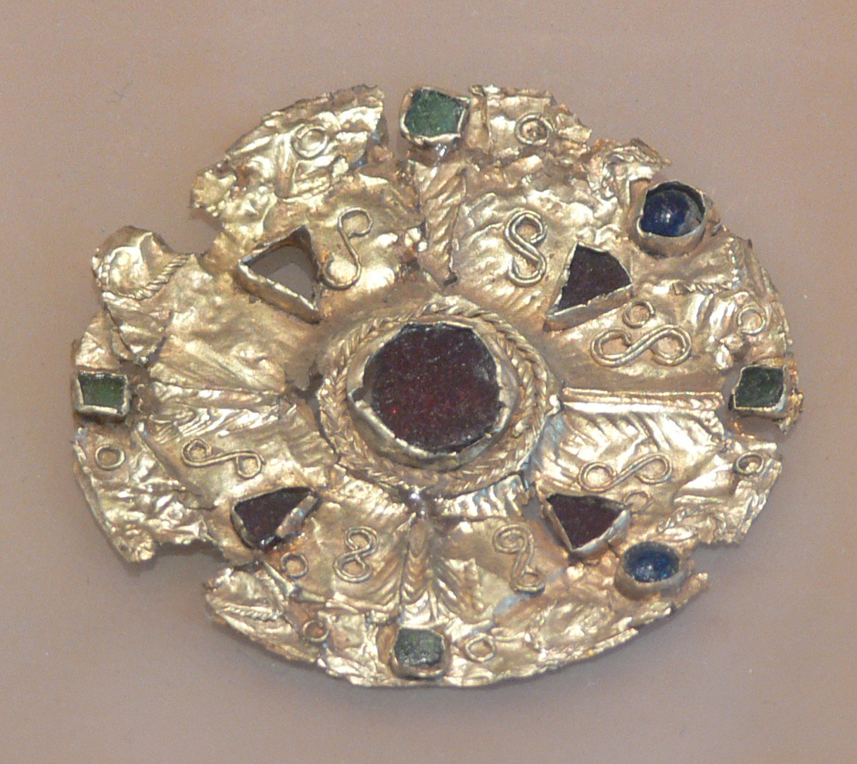 Fibule discoïde incrustée de pâtes de verre colorées. Trouvée lors des fouilles de l'église paléochrétienne de Chassey-lès-Montbozon (1967-1974). Vesoul, musée Georges-Garret, dépôt de l'Etat.